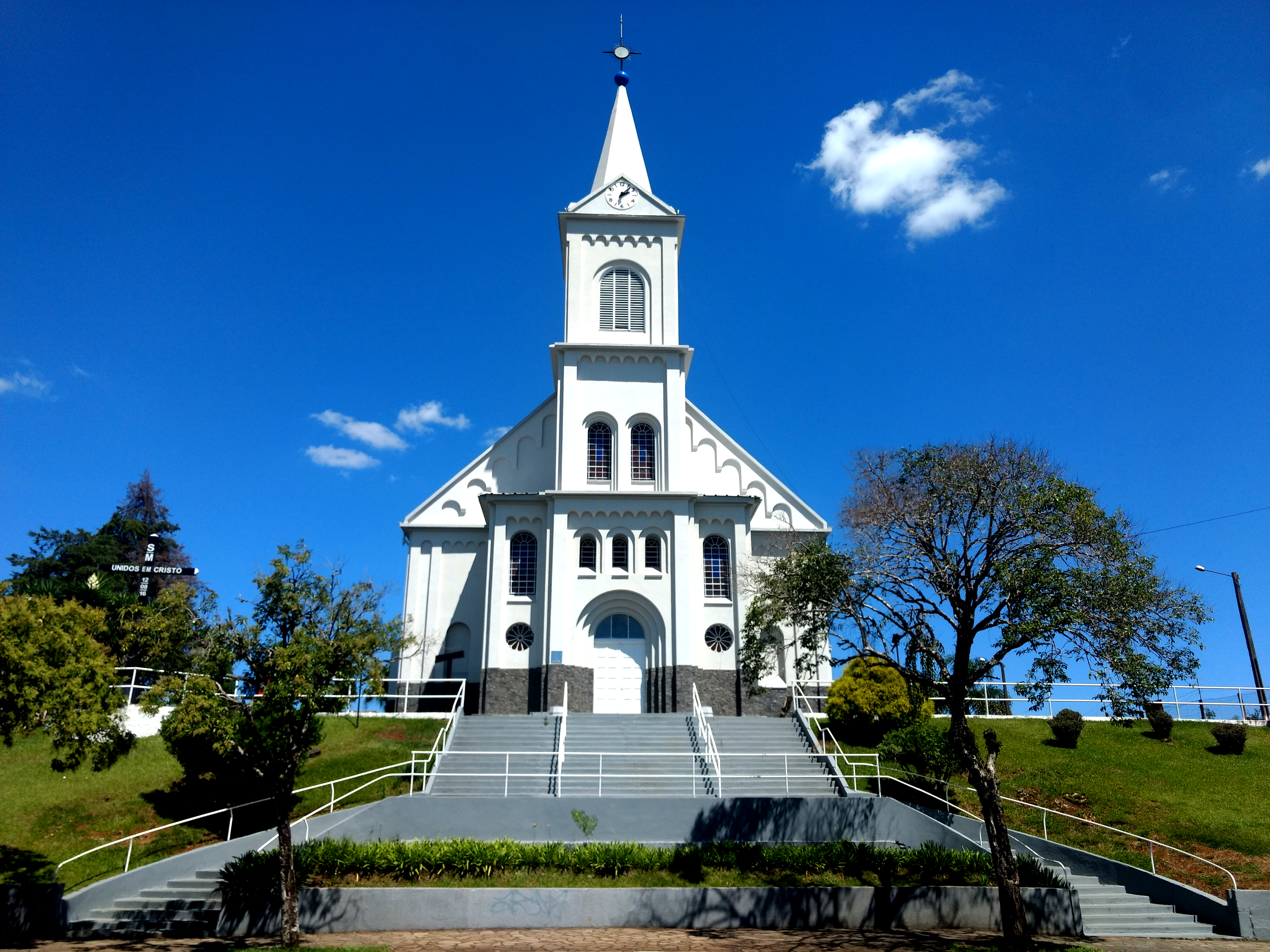 Catedral São Francisco de Assis em Caçador/SC